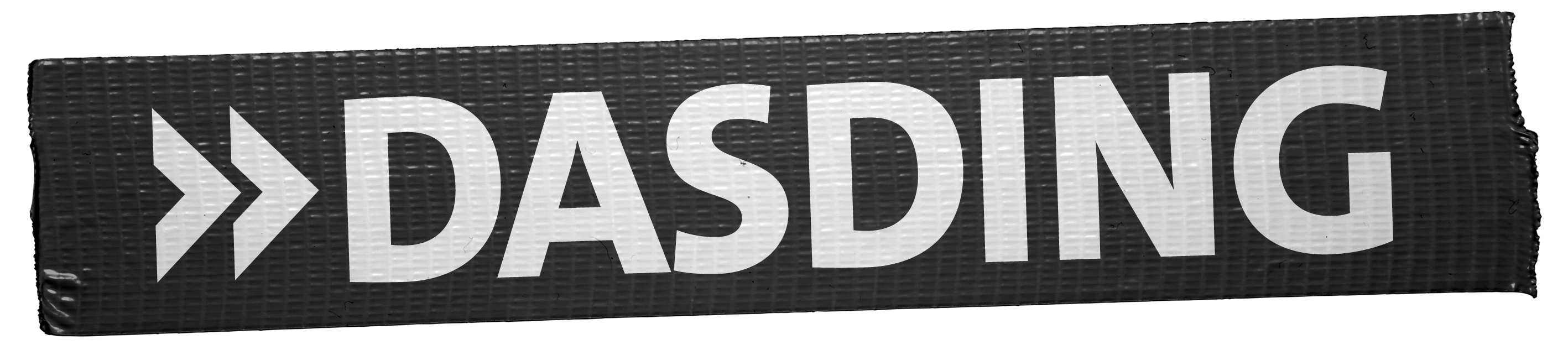 Logo von Dasding seit 2011